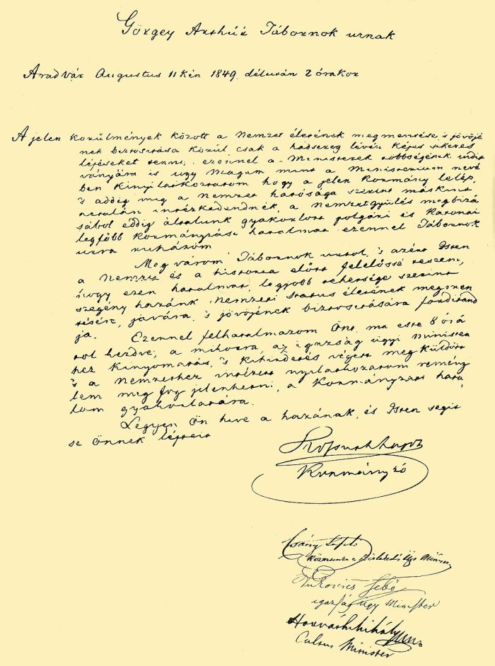 Kossuth Lajos levele Görgei Artúrhoz, amelyben lemond a kormányzóságról és a katonai és politikai hatalmat a tábornokra ruházza (1849. augusztus 11.)